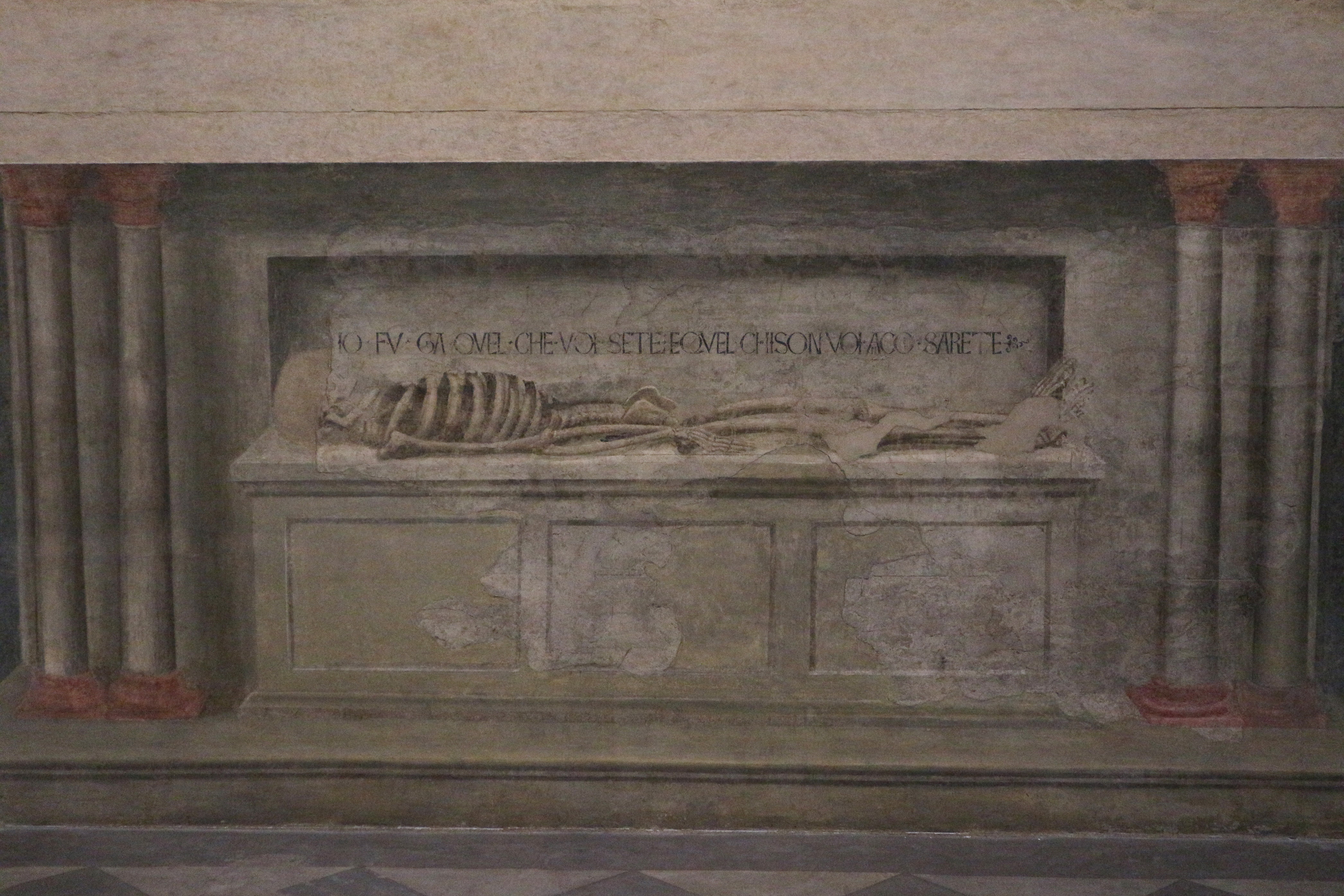 Dettaglio